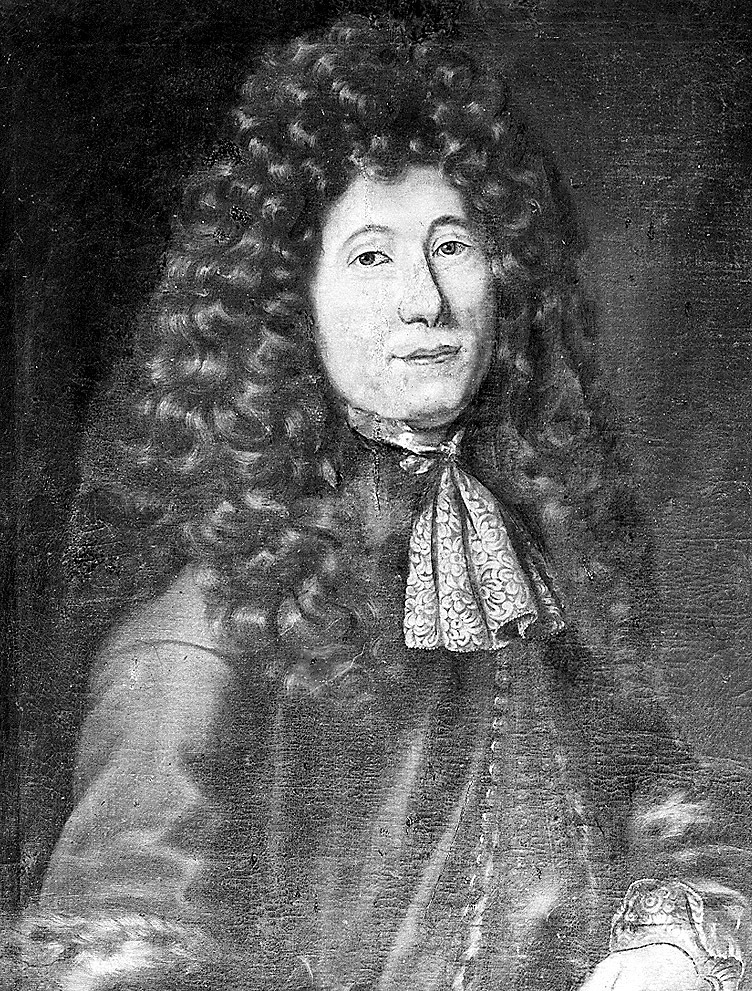 Hans Colbjørnsen